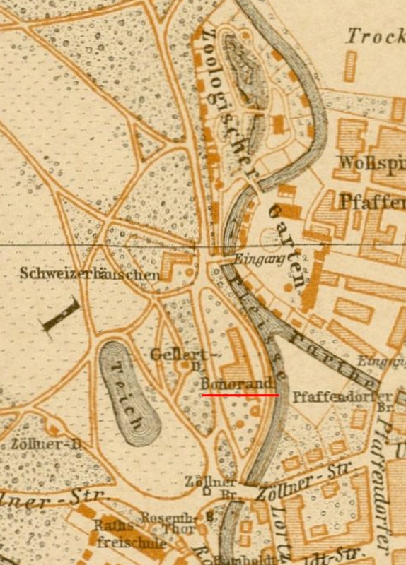 Die Lage des Café Bonorand auf einem Leipziger Stadtplan von 1890